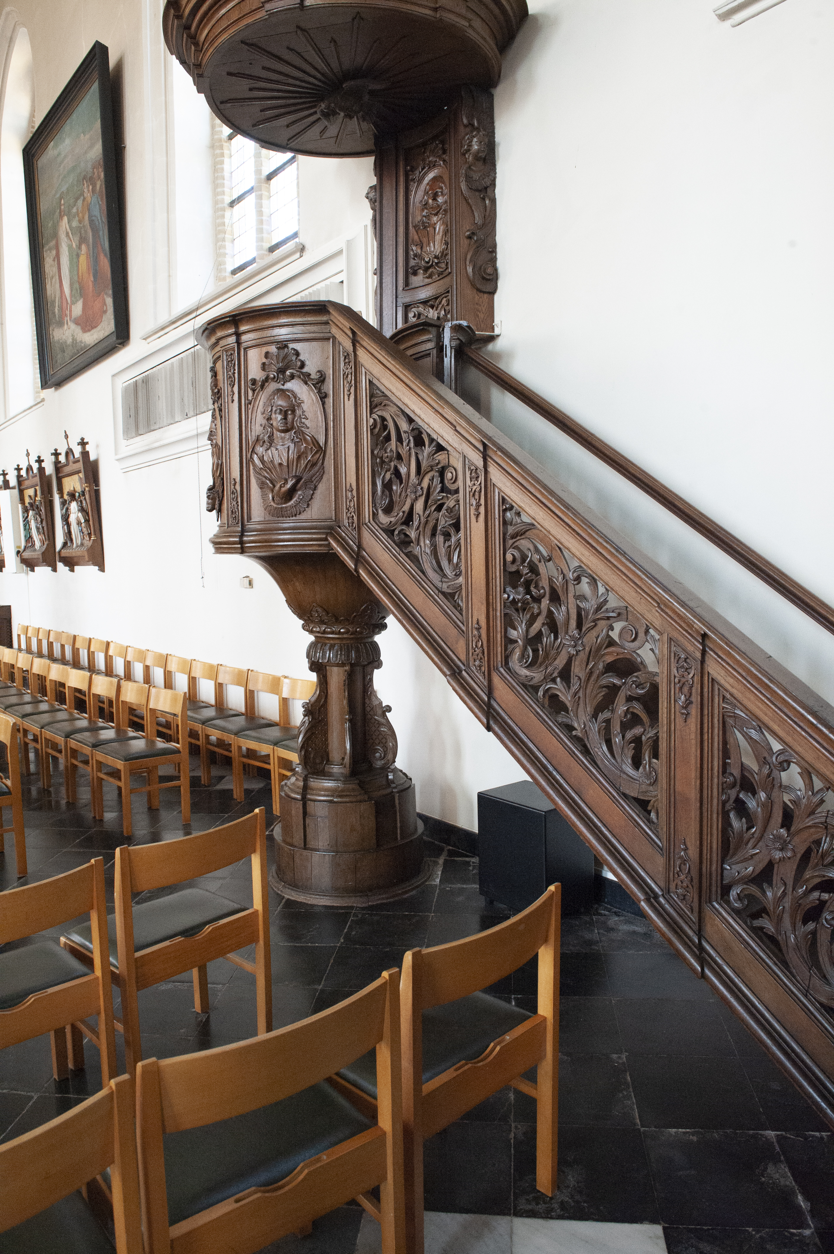 Predikstoel